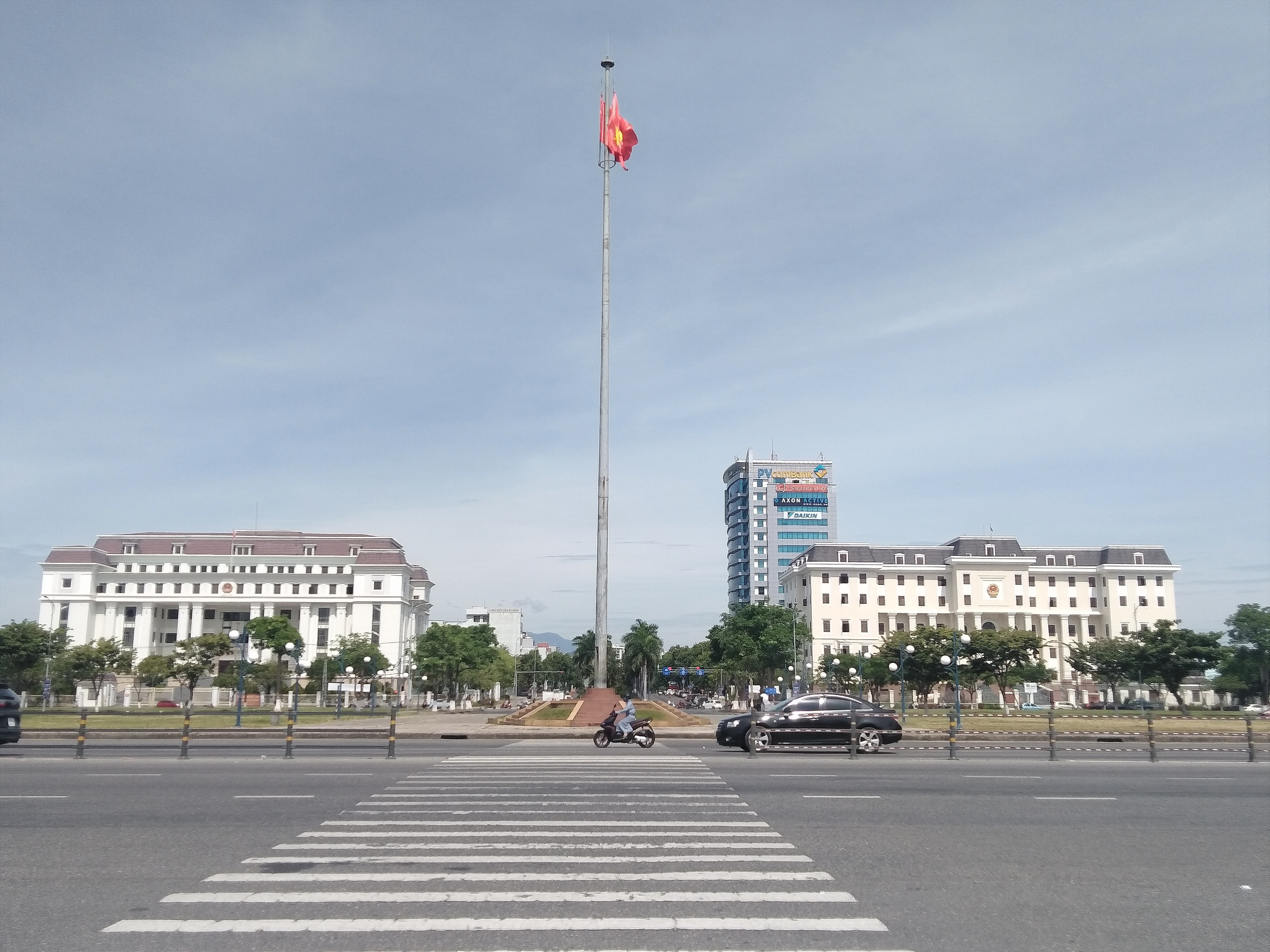 Tòa án và Tòa án Cấp cao tại Đà Nẵng